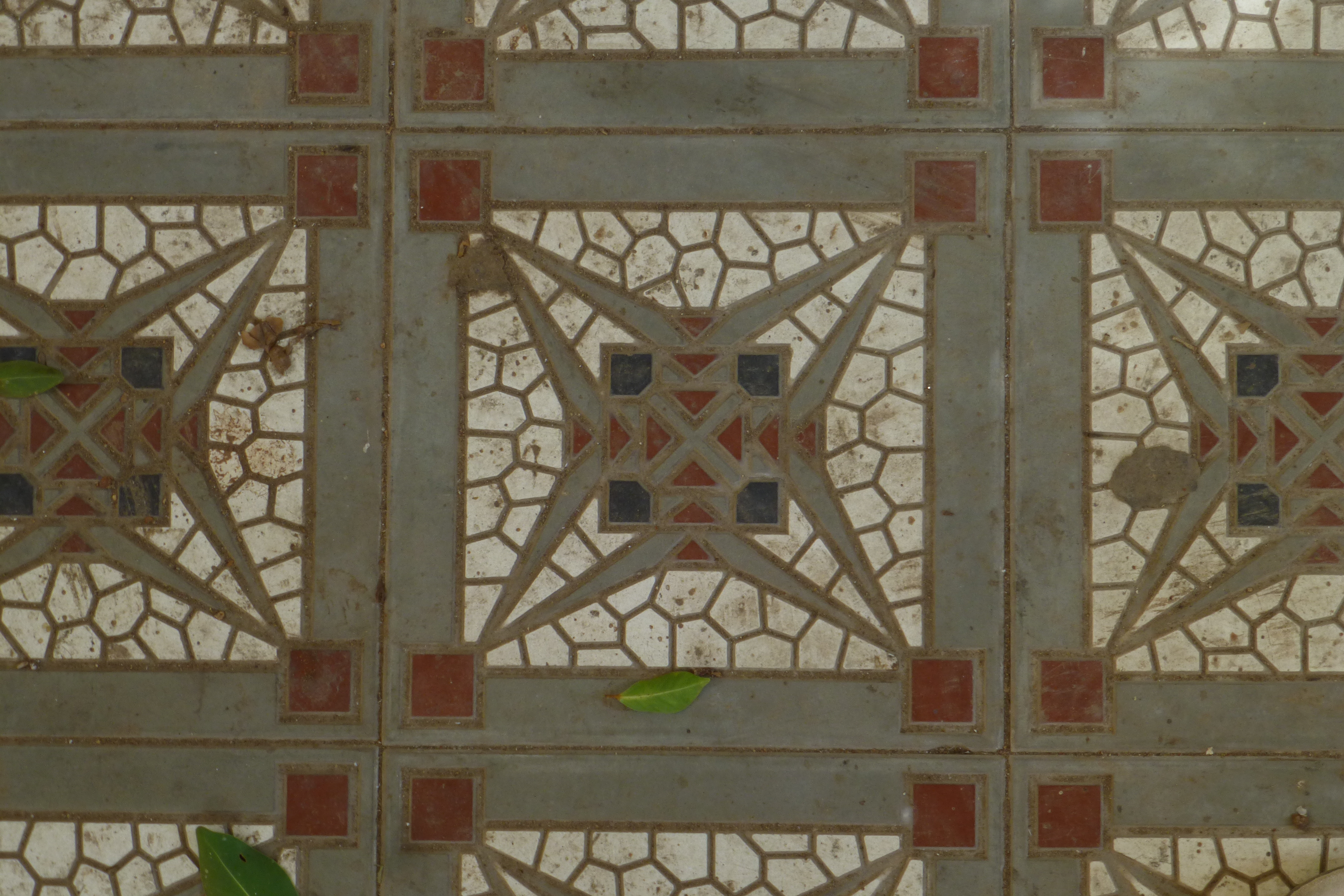 רח' מונטיפיורי 3, פתח תקווה